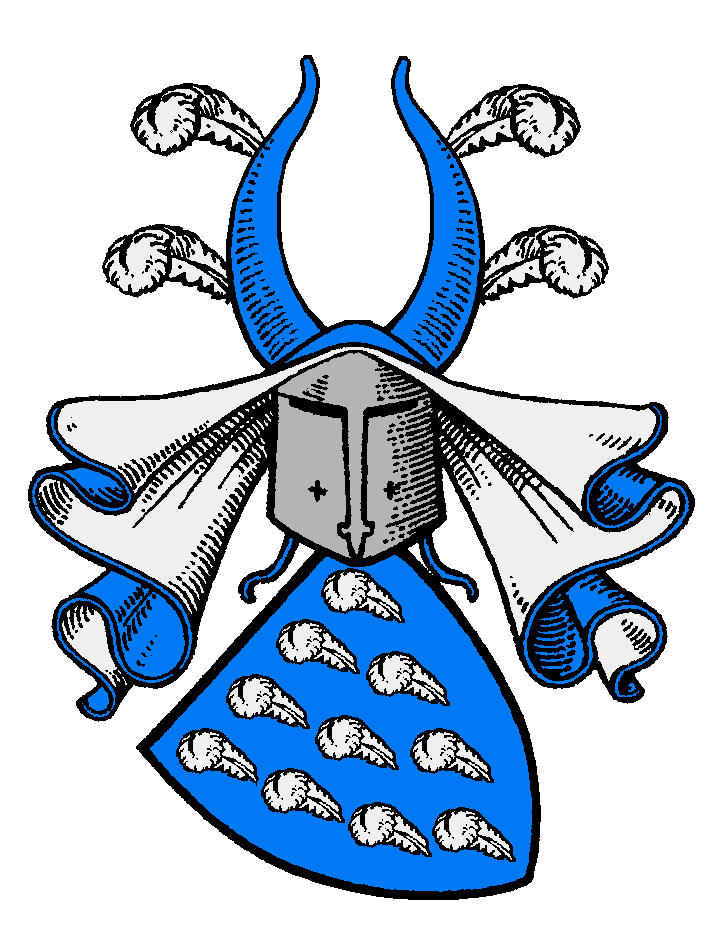 Wappen der Queis (Queiss; Queist; Variante: vgl. Zedlitz-Neukirch, Neues preußisches Adelslexicon, Band 4, S. 74